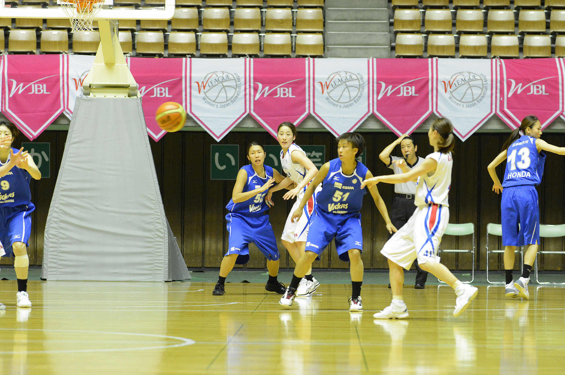 WJBL 14-15レギュラーリーグ、デンソー対羽田。秋田県立体育館。